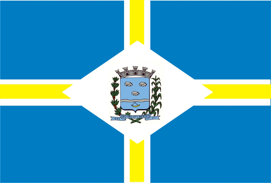 Bandeira do município de Cerqueira César, São Paulo, Brasil